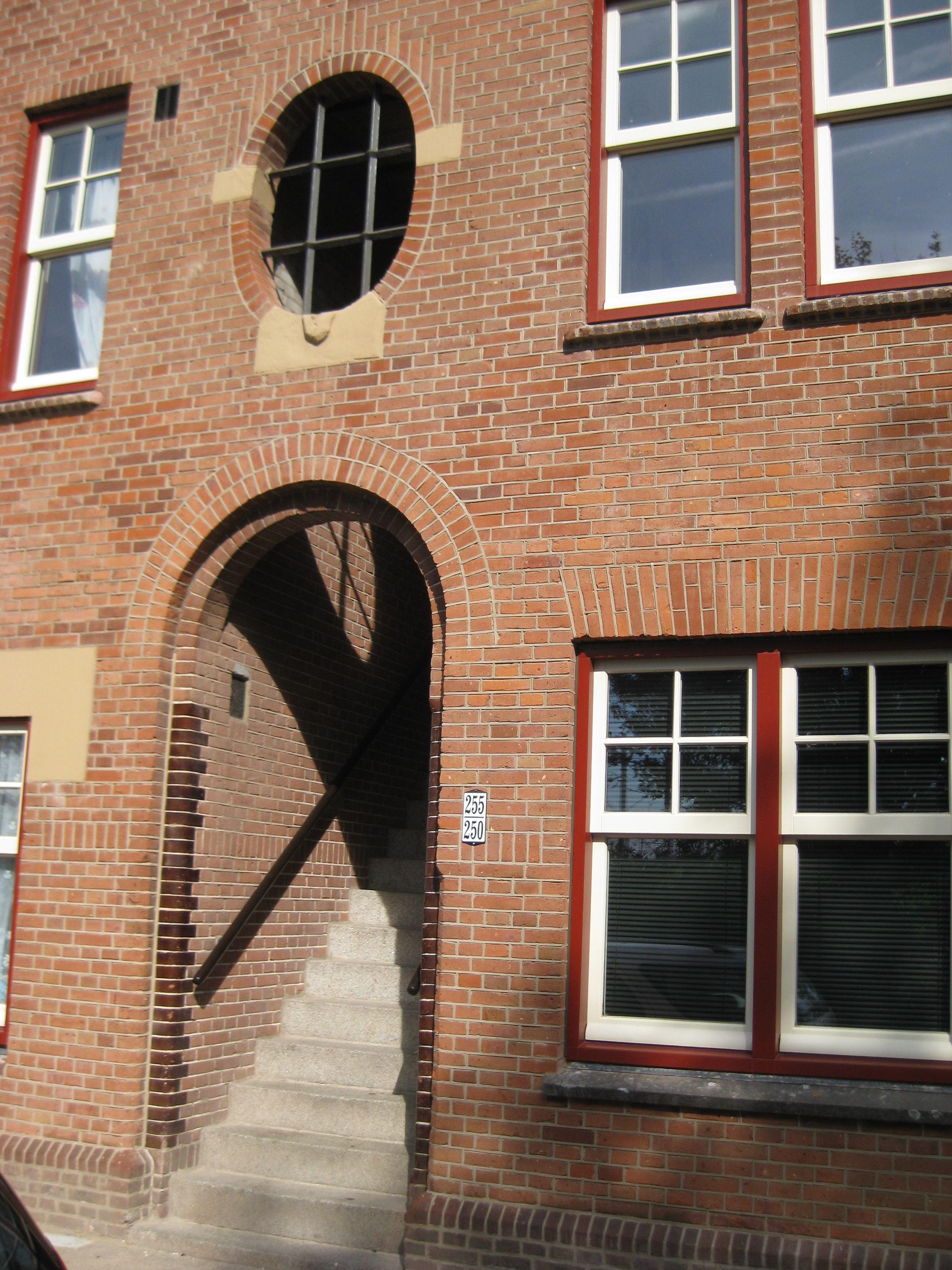 Portiek Zaanstraat 250, Amsterdam-West, Spaarndammerbuurt, Zaanhof. Sociale woningbouw van woningbouwvereniging Patrimonium. Architecten Tj. Kuipers en A.U. Ingwersen, ontworpen in 1915-1916, voltooid 1919.